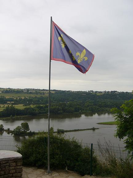 Drapeau de l'Anjou flottant sur l'éperon rocheux de Champtoceaux au-dessus de la Loire.